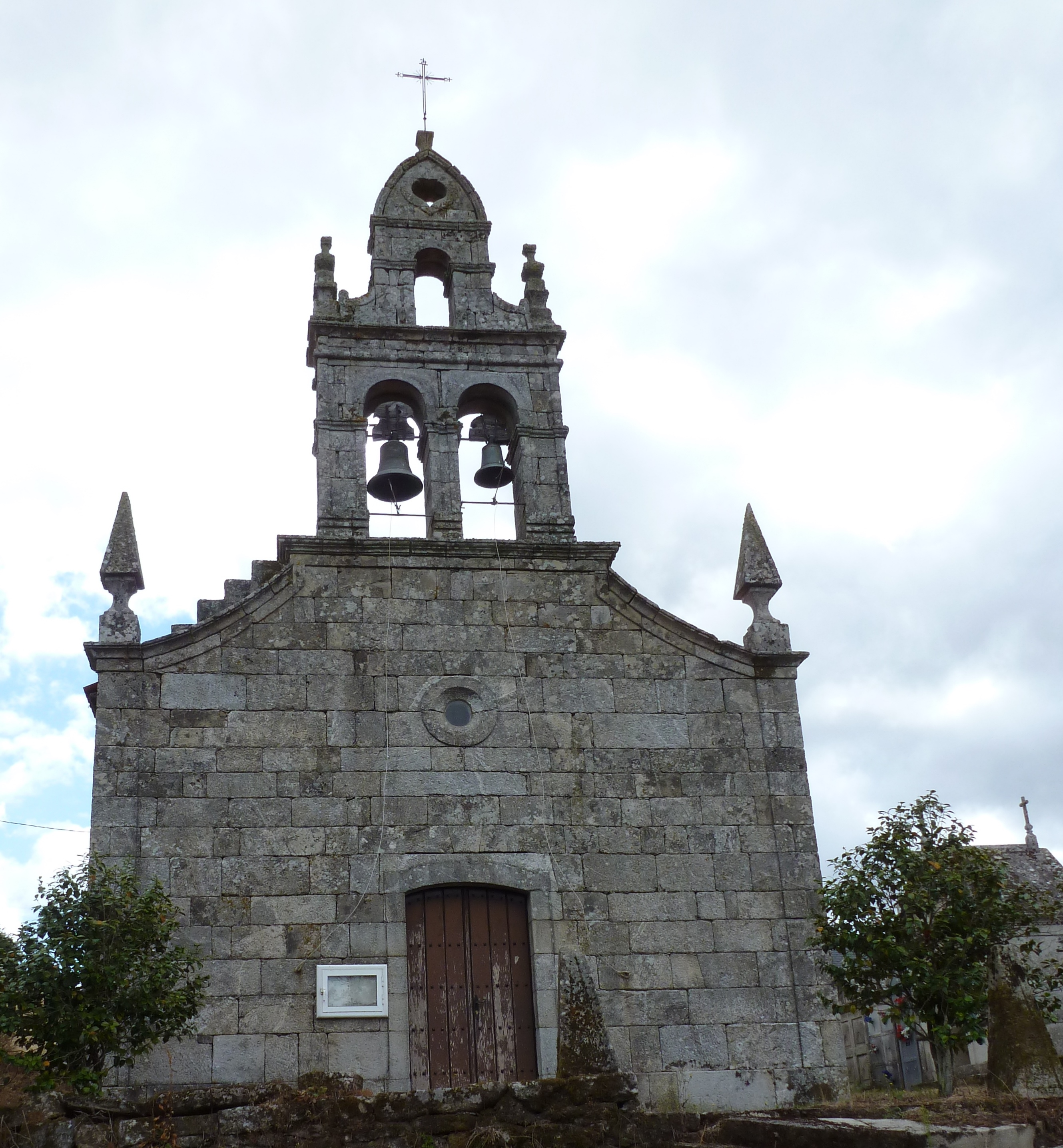 Igrexa de Santo Estevo de Cartelos, concello de Carballedo, Lugo